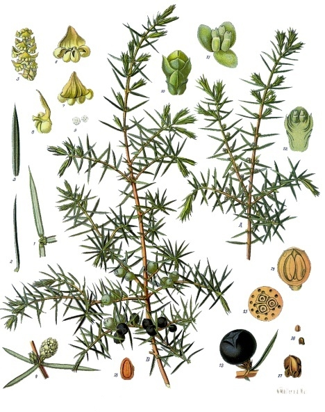 Gemeiner Wacholder. A männlicher Blüthenzweig, natürl. Grösse; B Zweig der weiblichen Pflanze, desgl.; 1 Querschnitt eines jüngeren Zweiges, mit Nadeln, vergrössert; 2 u. 3 Nadeln von verschiedenen Seiten, desgl.; 4 Zweigstück mit männlichem Blüthenkätzchen, desgl.; 5 männliches Blüthenkätzchen, geöffnet, desgl.; 6, 7, 8 Staubblätter von verschiedenen Seiten, desgl.; 9 Pollen unter Wasser, desgl.; 10 weibliches Blüthenkätzchen, desgl.; 11 Eichen mit den Fruchtblättern, desgl.; 12 weibliches Kätzchen im Längsschnitt, desgl.; 13 Beerenzapfen, desgl.; 14, 15 derselbe im Längs- und Querschnitt, desgl.; 16, 17 Same, natürl. Grösse und vergrössert; 18 derselbe im Längsschnitt, desgl.